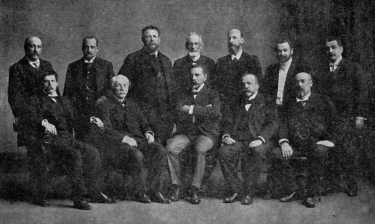 Fotografía de los miembros de la Corte Suprema de Justicia de Chile, hacia 1908.